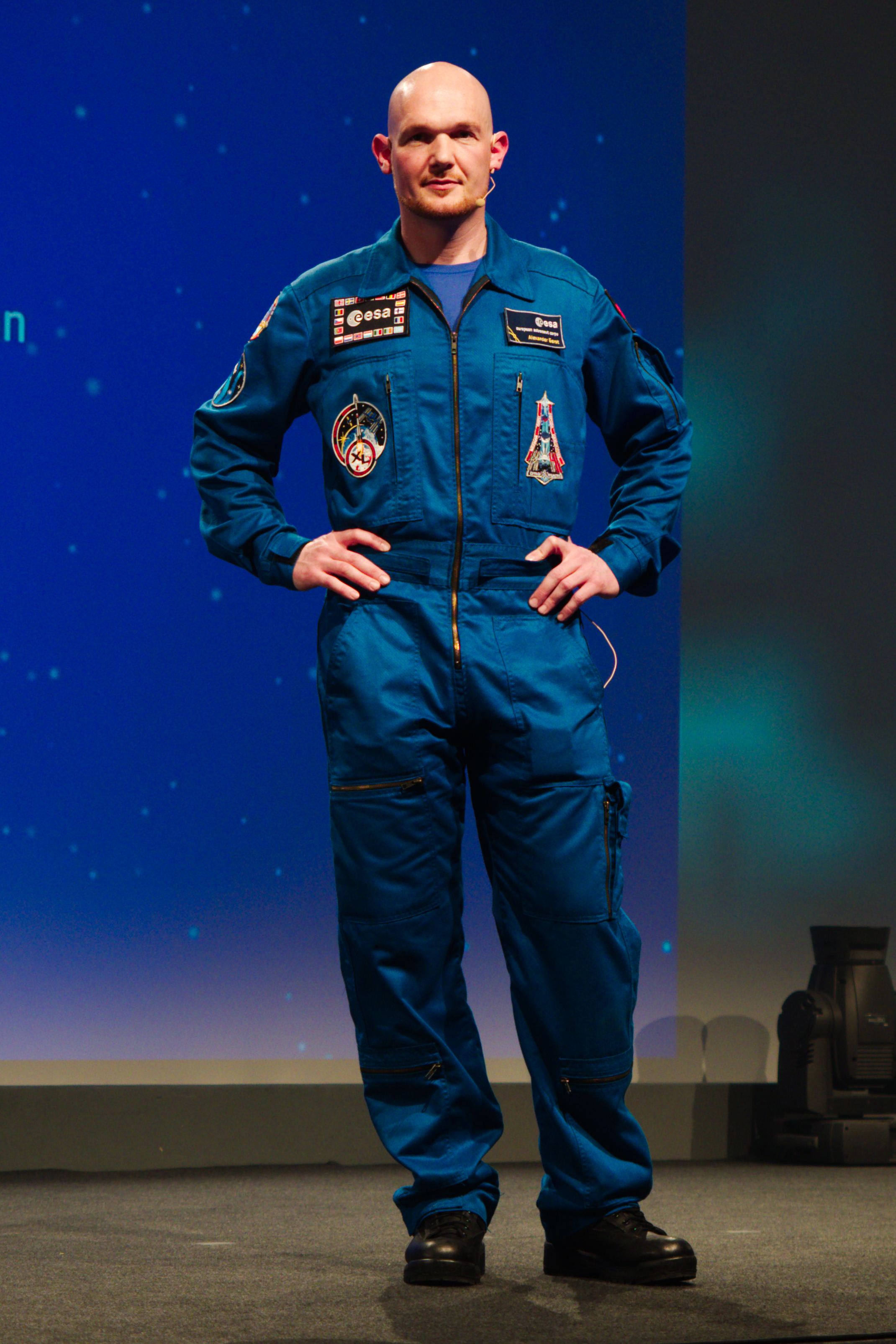 Alexander Gerst auf der re:publica 2015